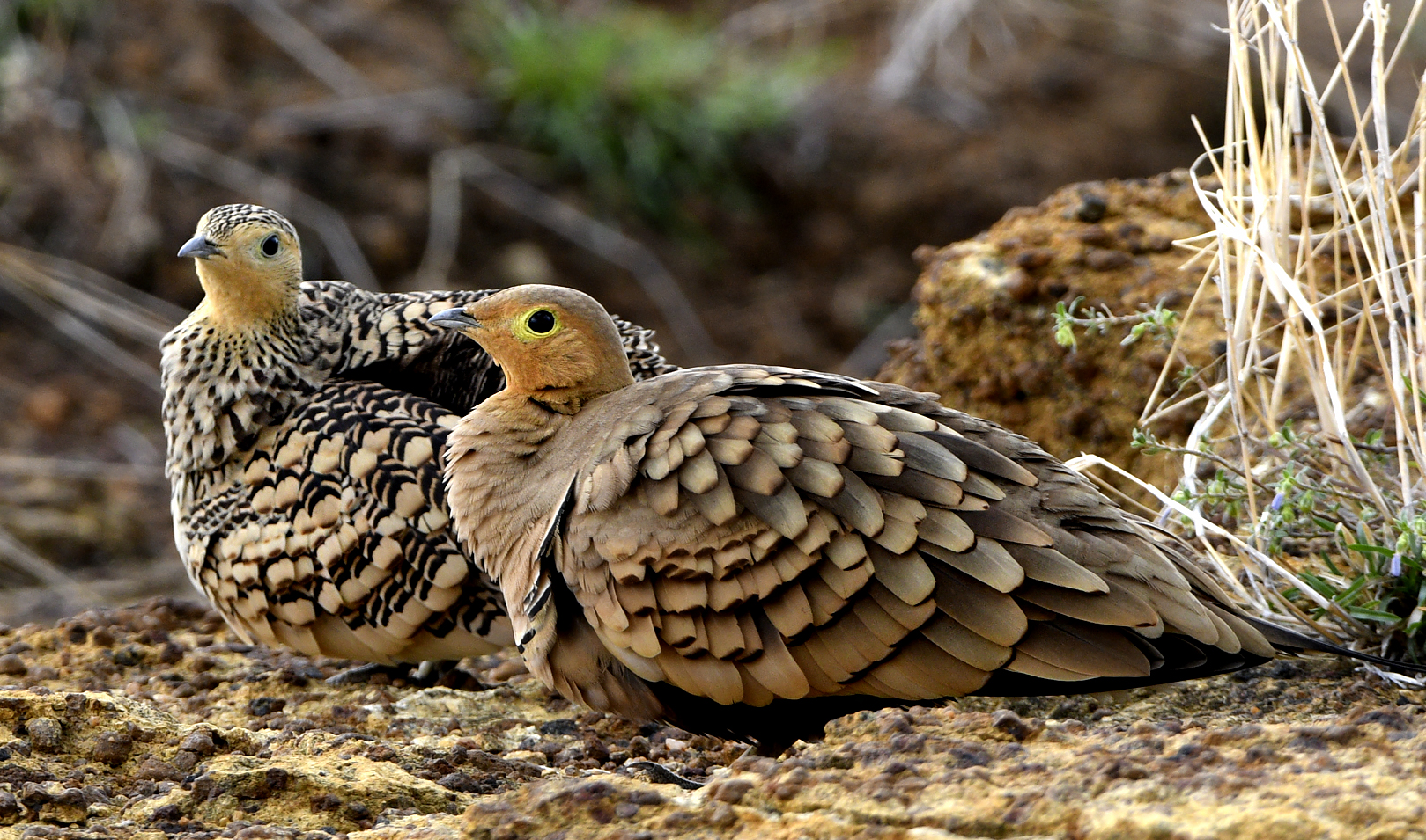 Male&Female